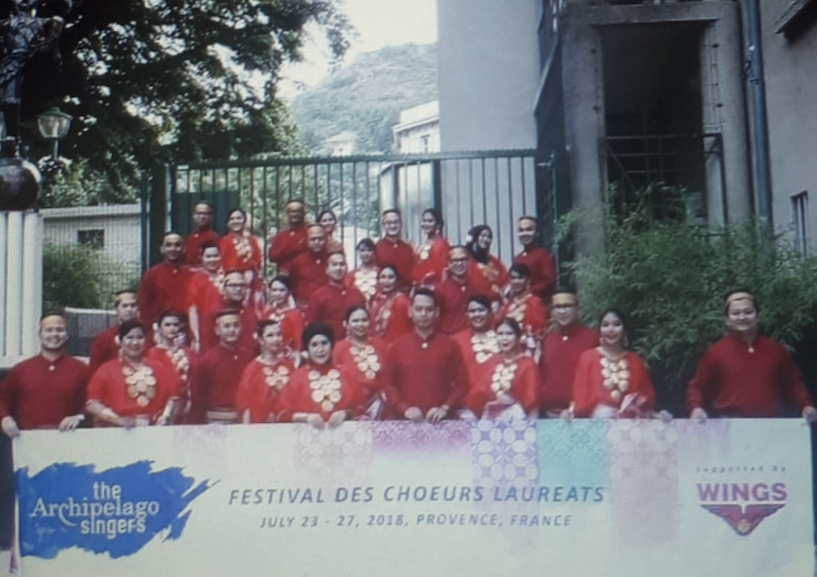 Bodo Costume in France